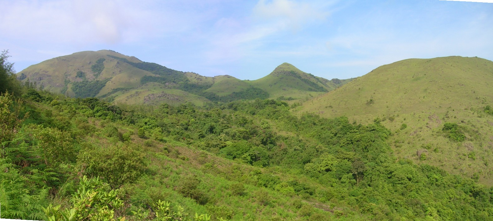 Tadiandamol panorama, Coorg Photo by L. Shyamal, Coorg, 2006